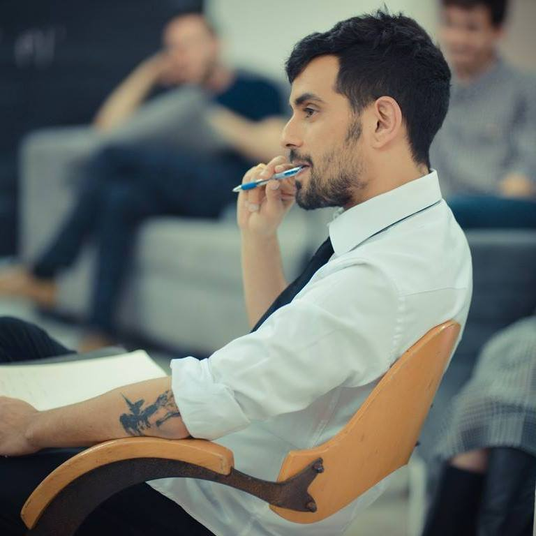 ג'ייסון דנינו-הולט - תמונת פרופיל